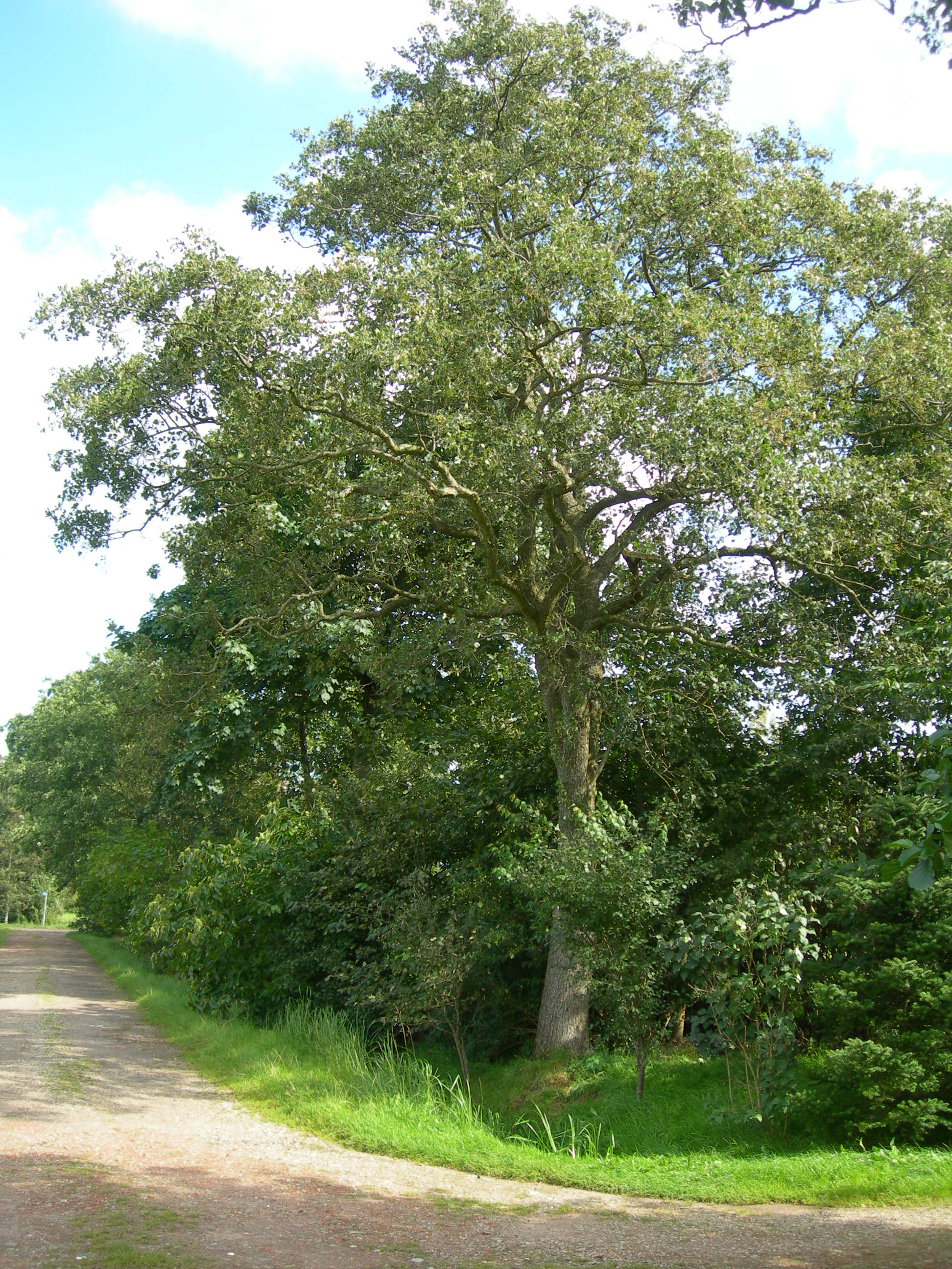 Deze grote zwarte els wordt geschat op 180 jaar. Elsen komen veel voor in de Friese streek de Wouden.